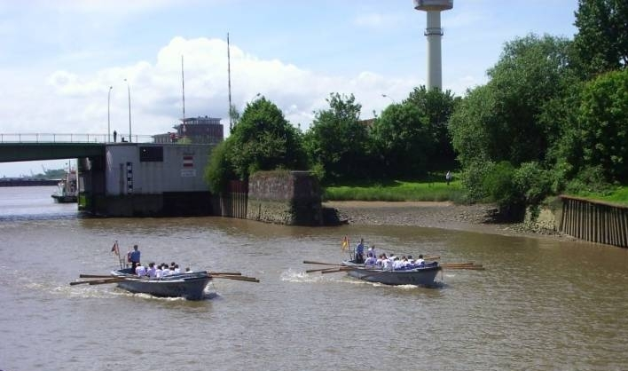 "Team Oettinger" vs. "Joint Venture", Kutterpullen Hochschulfete 2006, HS Bremerhaven